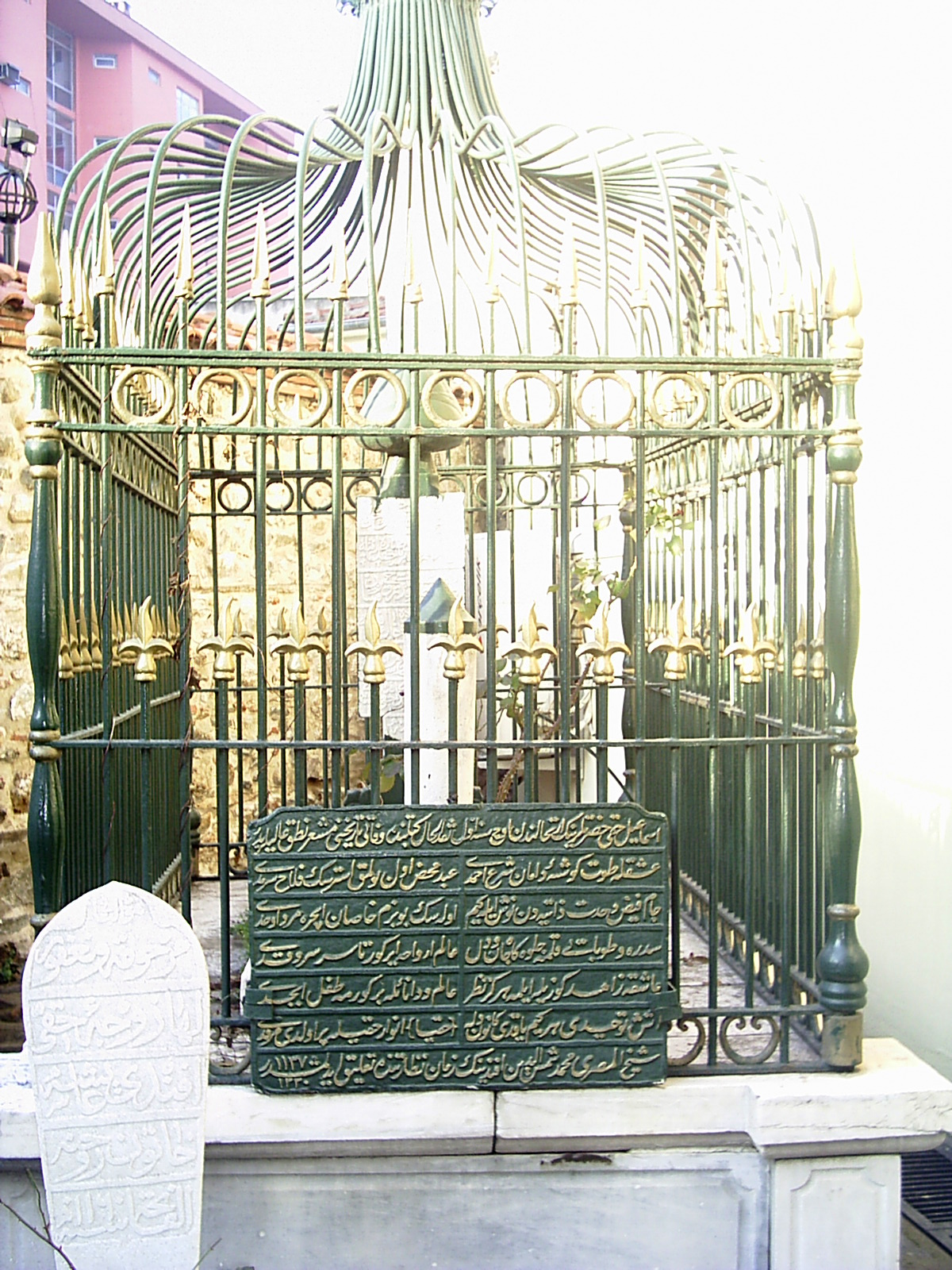 Ismael Hakki’s tomb is at the rear of the mosque in the tekke building: İsmail Hakkı Kuran Kursu, Tuzpazarı, İsmail Hakkı Cd., 16020 Osmangazi, Bursa